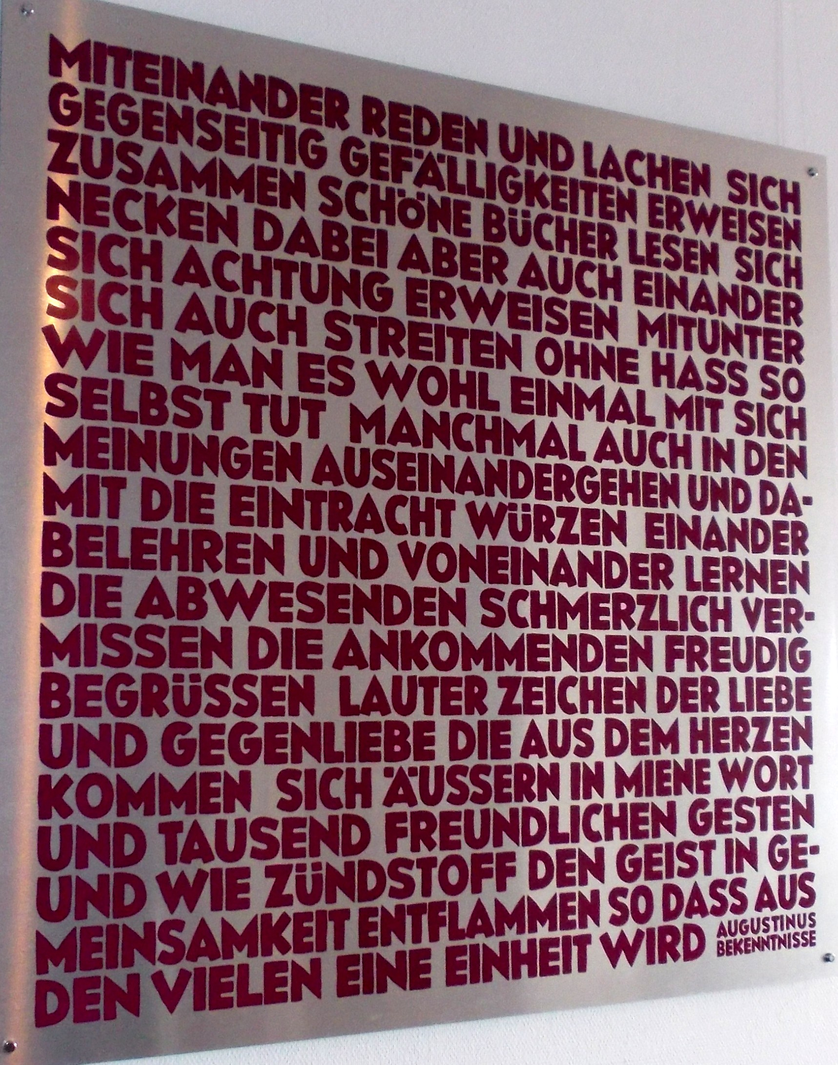 Augustinum Hamburg, Motto des Augustinums